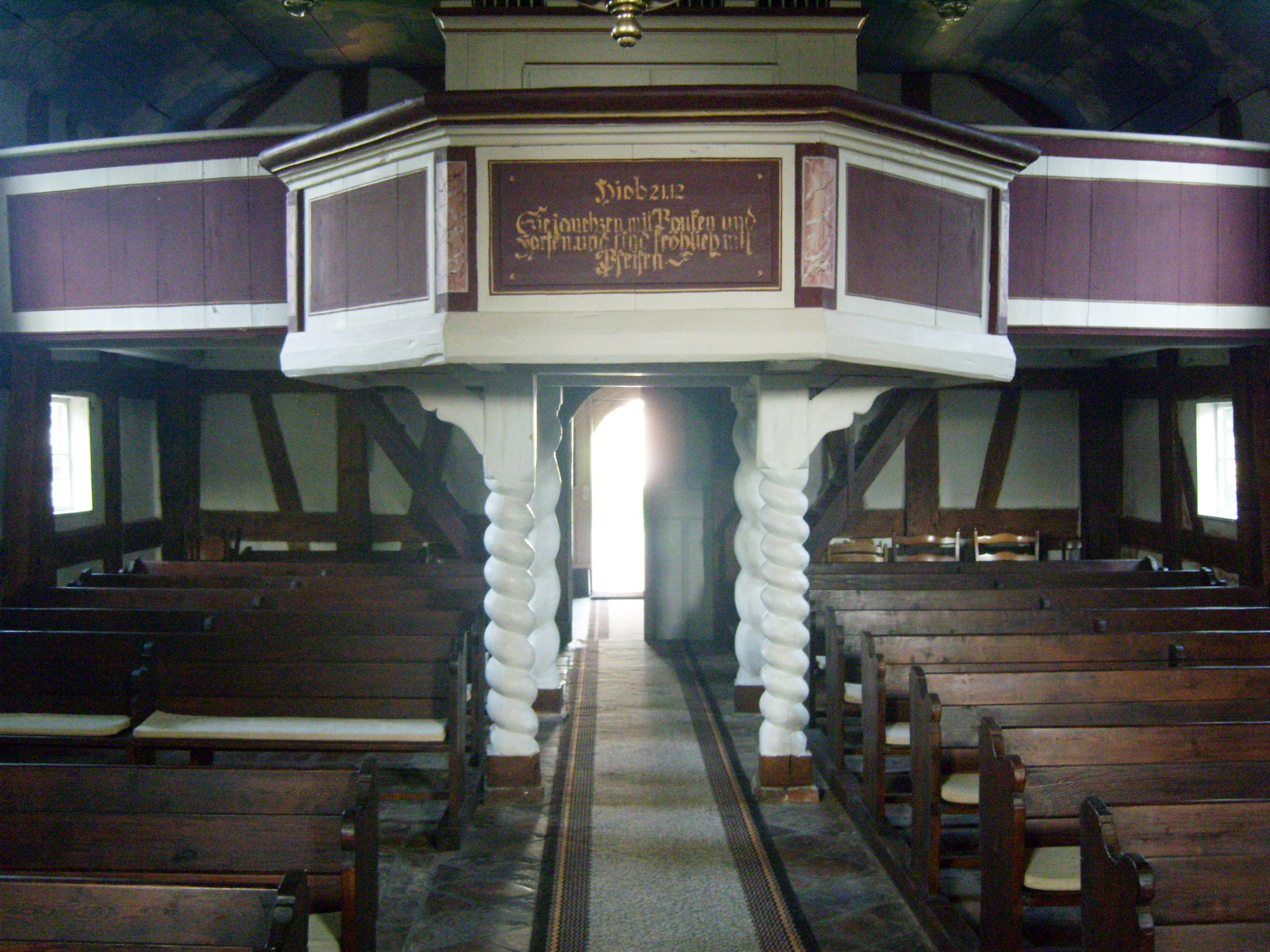 Denkmalgeschützte Fachwerkkirche Waldow Schönwald Blick durch die Kirche auf das Eingangsportal